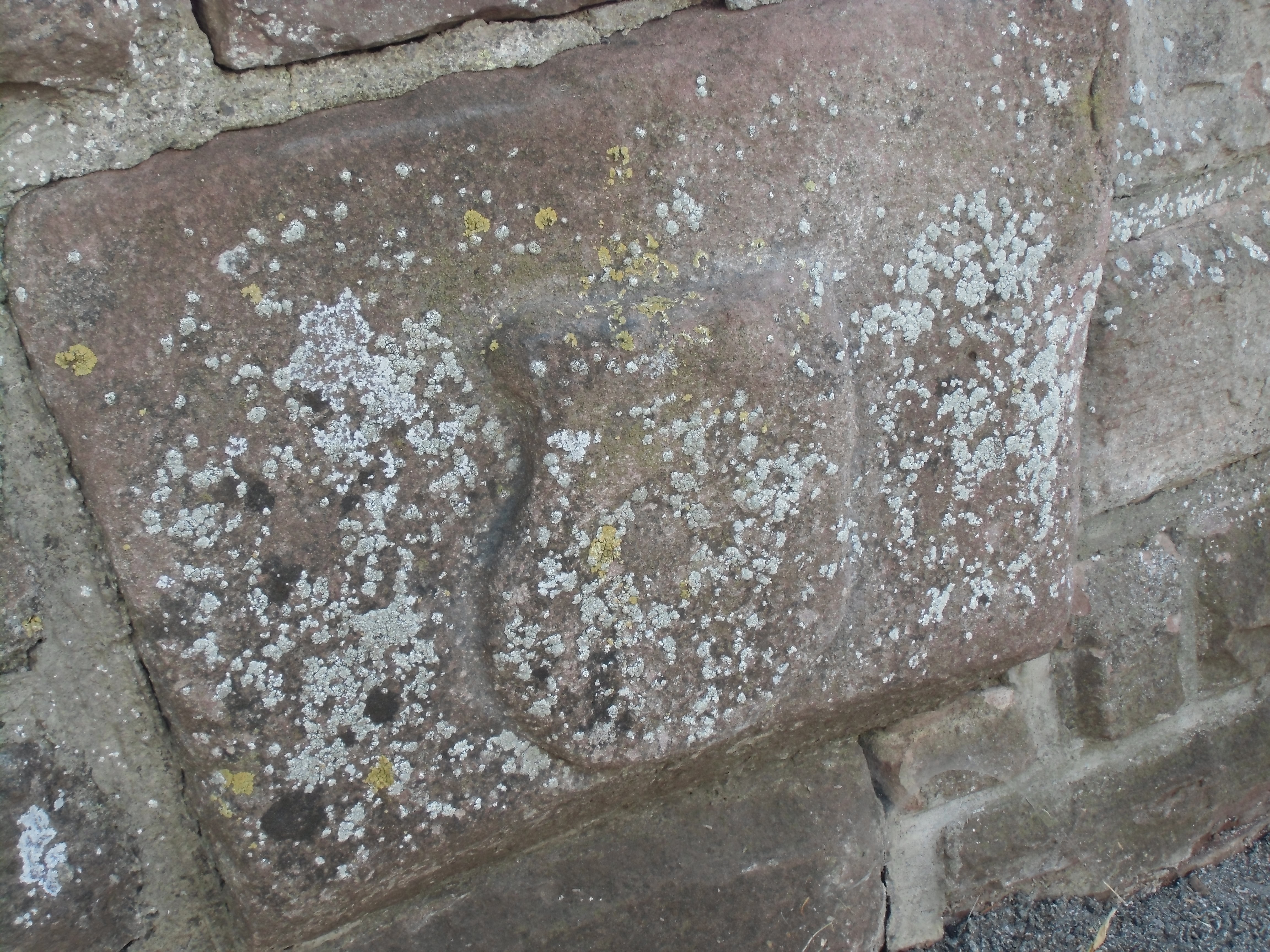 Wappenstein des Ebhauser Tores - Bild 2